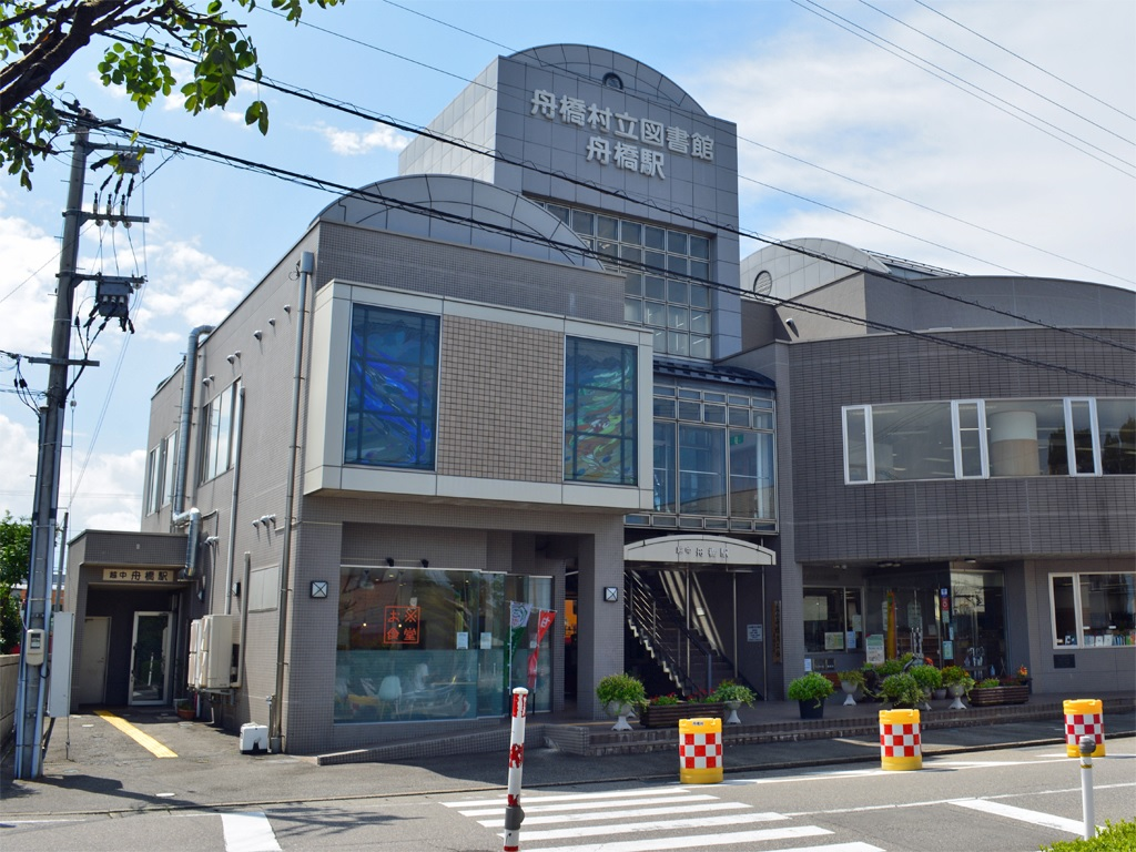 富山地方鉄道本線 越中舟橋駅 駅舎